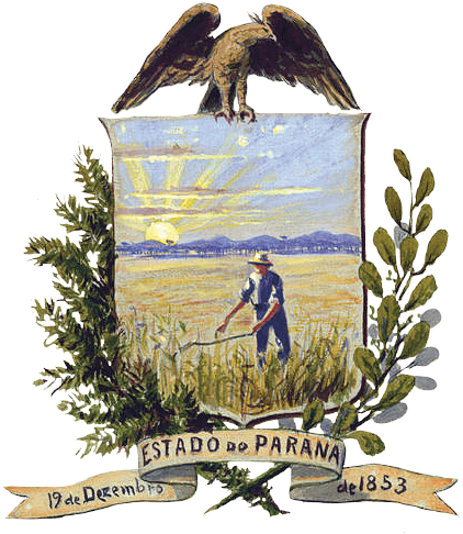 Brasão do Paraná (1910) idealizado por Alfredo Andersen.